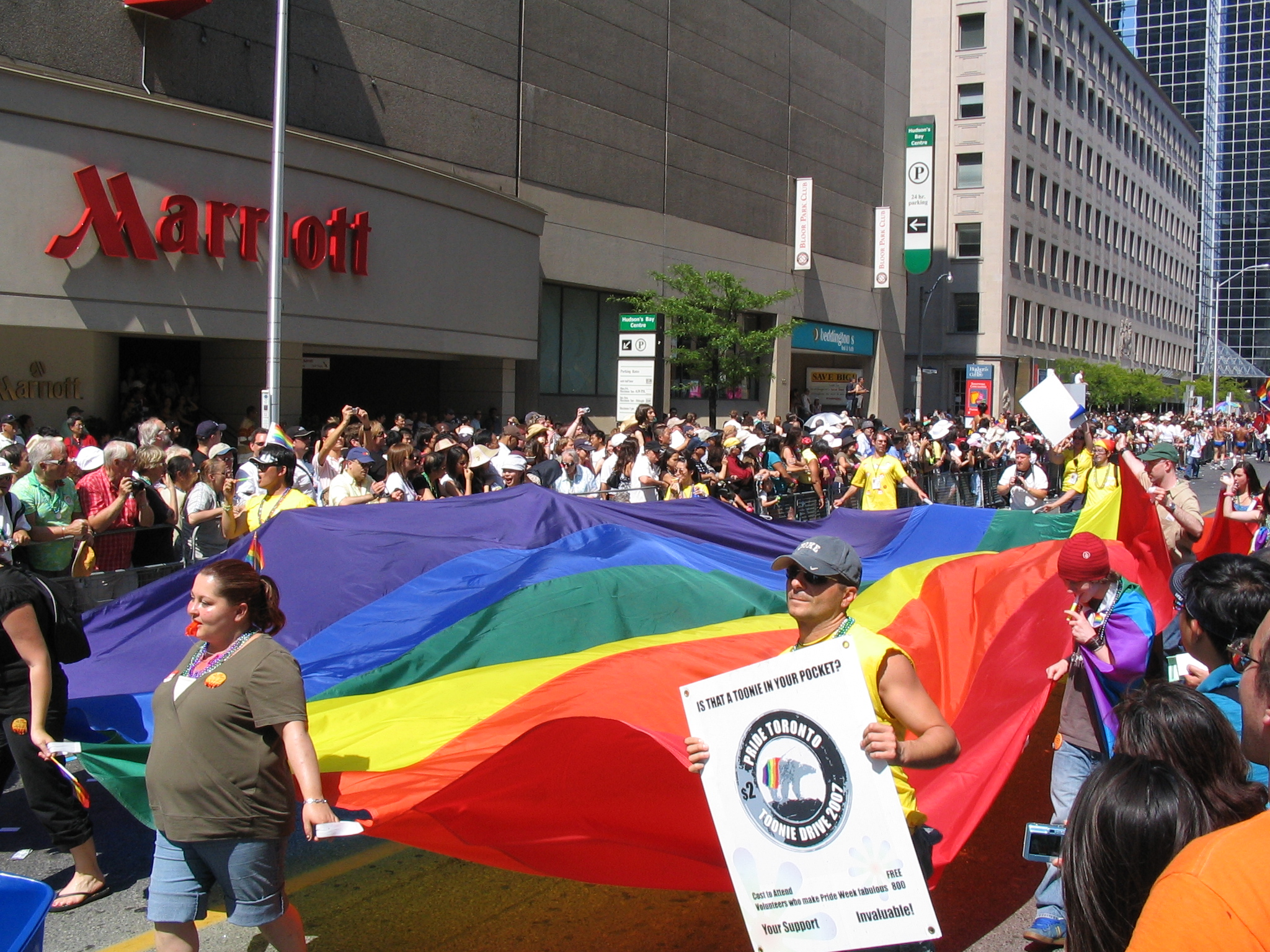 Toronto Gay Pride Parade 2007Toronto Pride Parade 2007